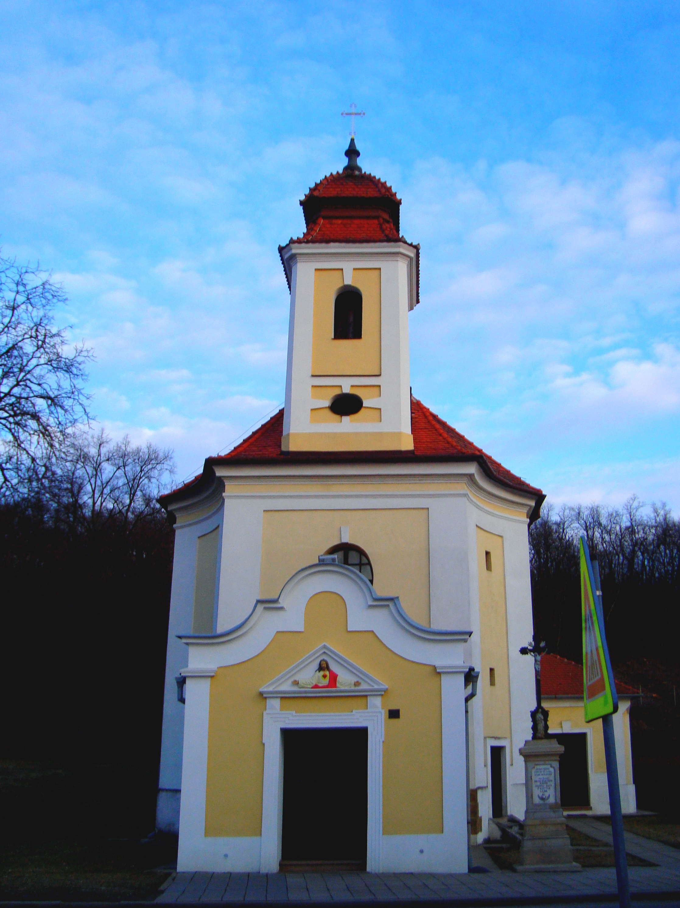 Neslovice kostel Narození Panny Marie